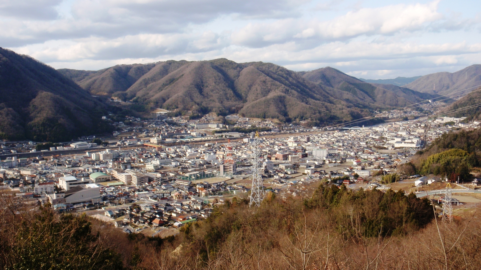 岡山県高梁市にある国道432号愛宕ループ橋付近からの市内の眺め。